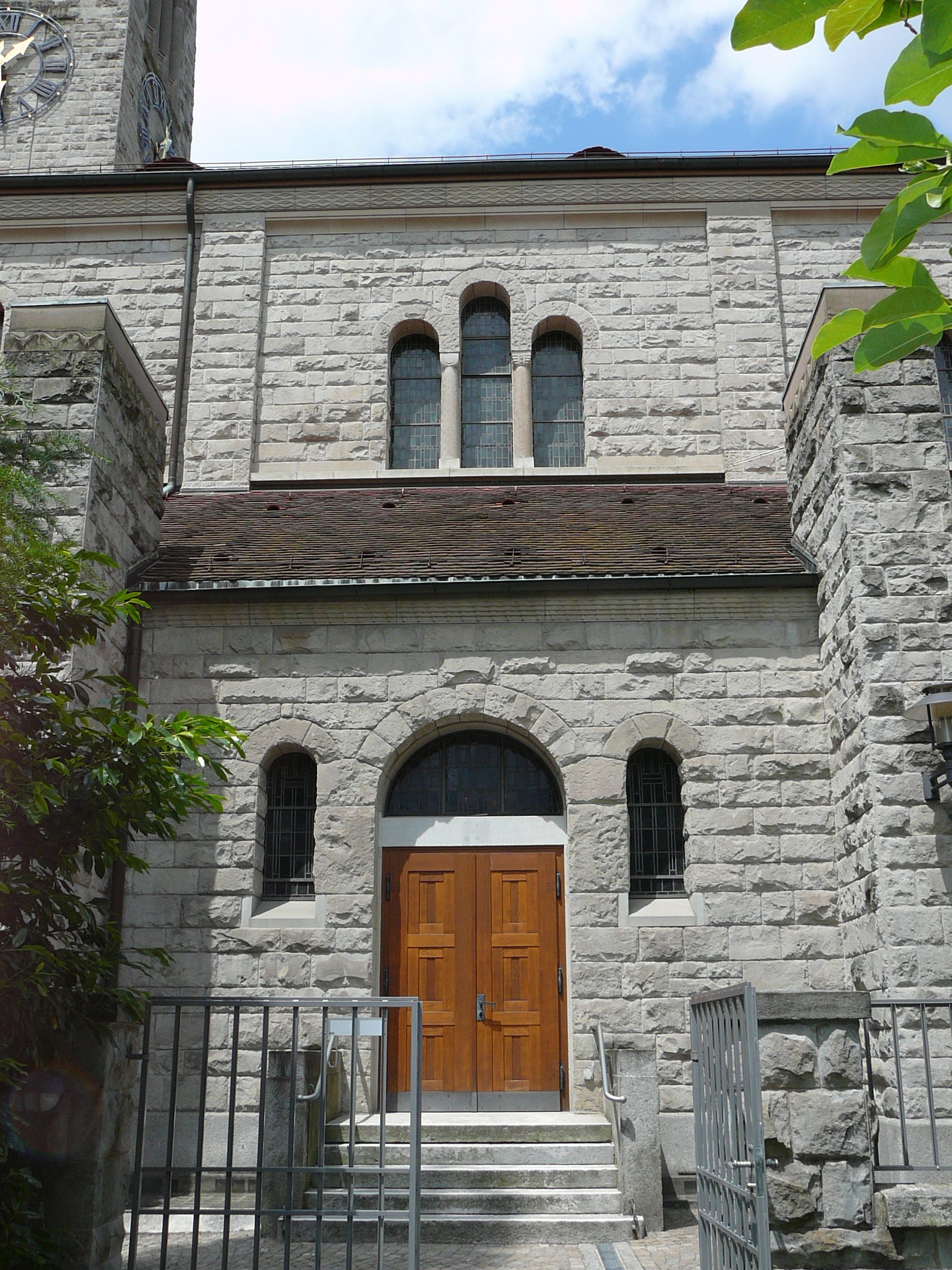 Römisch-katholische Kirche St. Anton Zürich-Hottingen, östlicher Seiteneingang